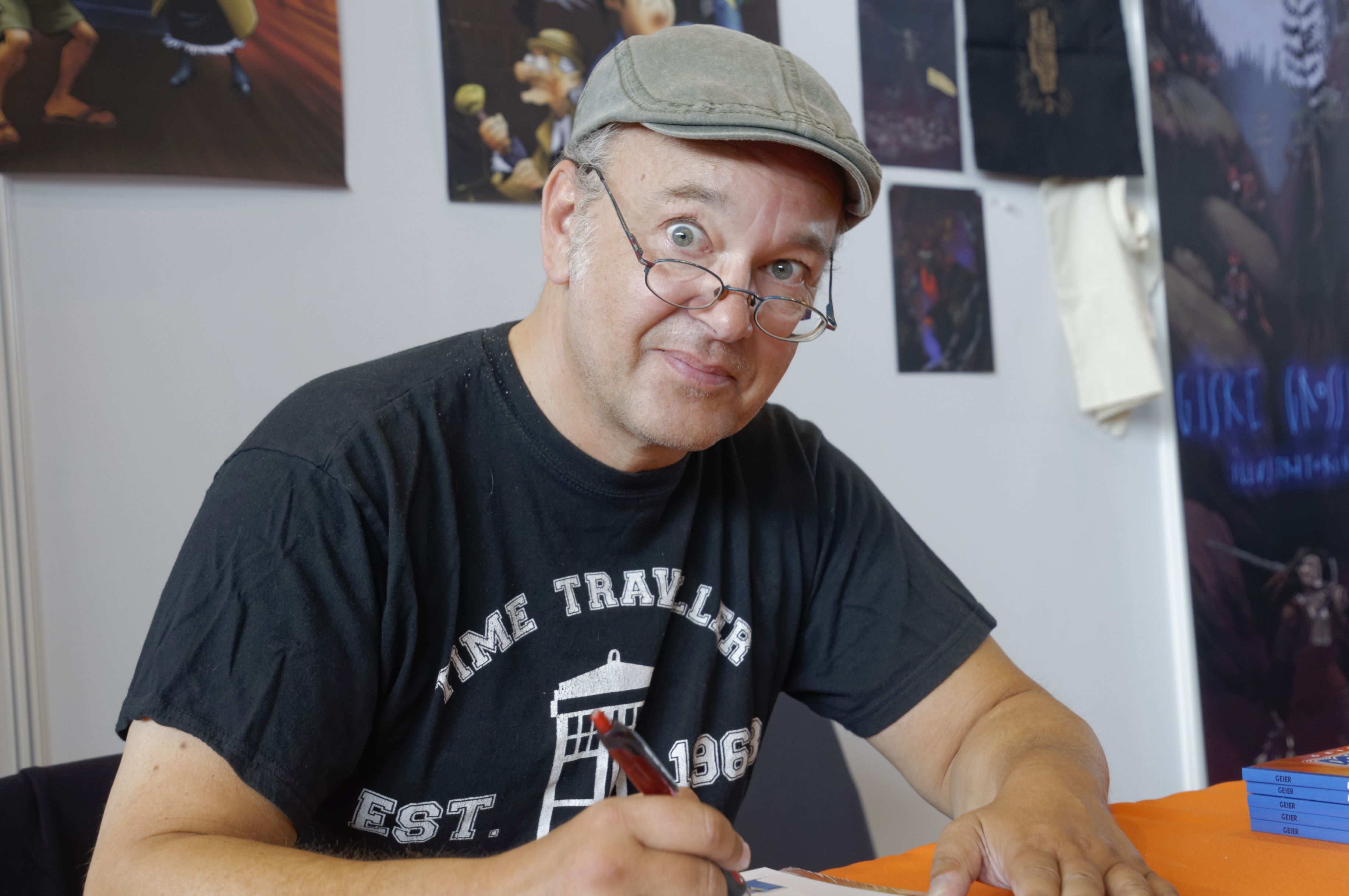 Bilder von der Comic Con Germany in Stuttgart 2017